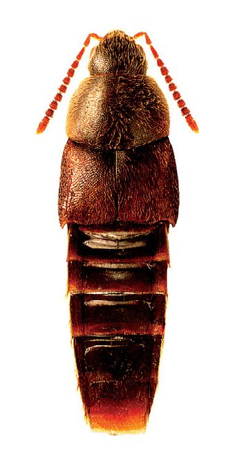 Oxypoda opaca